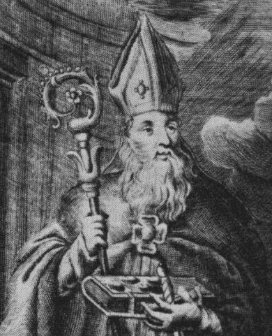 Česky: Svatý Bystrík